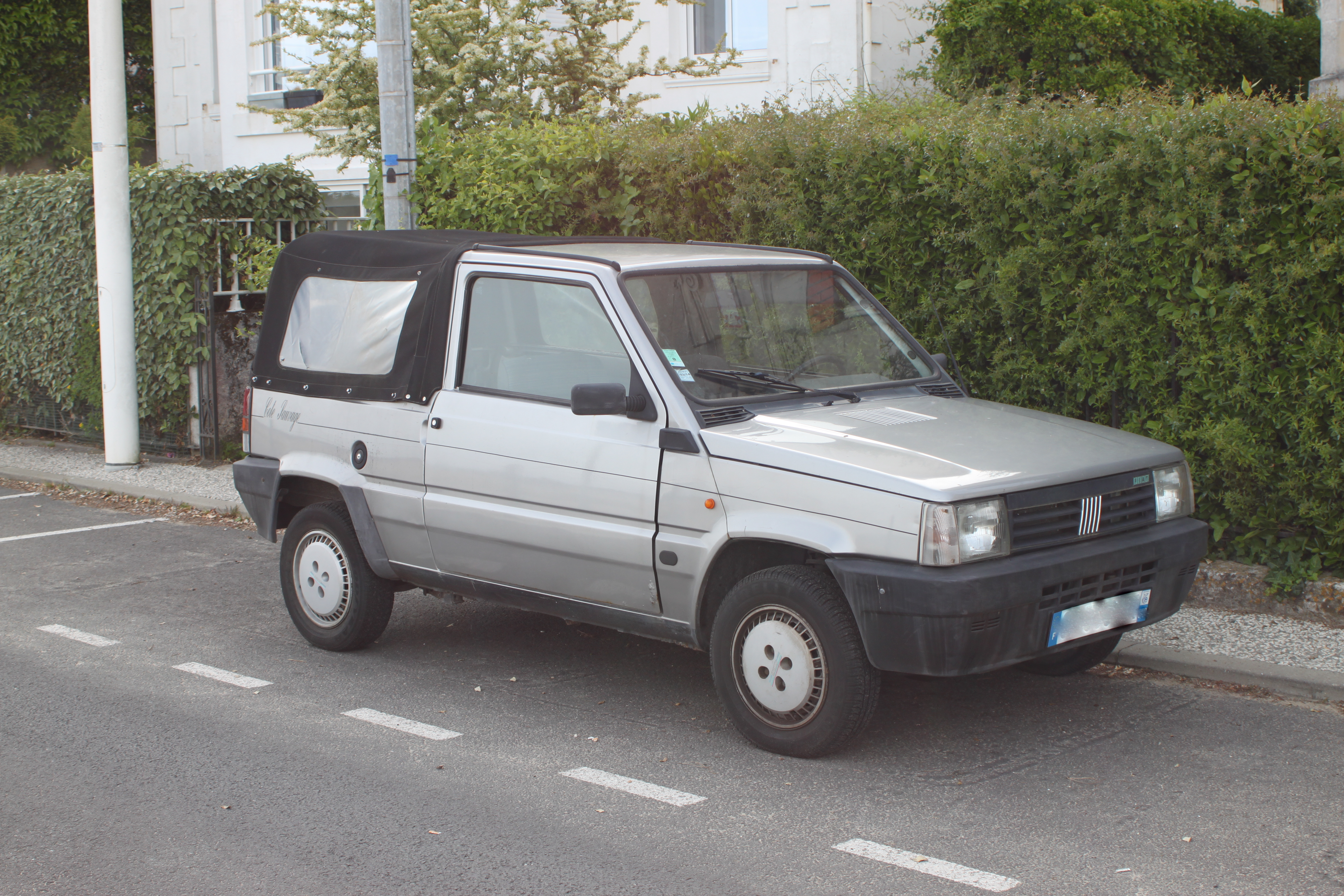 Panda Côte Sauvage 1980.